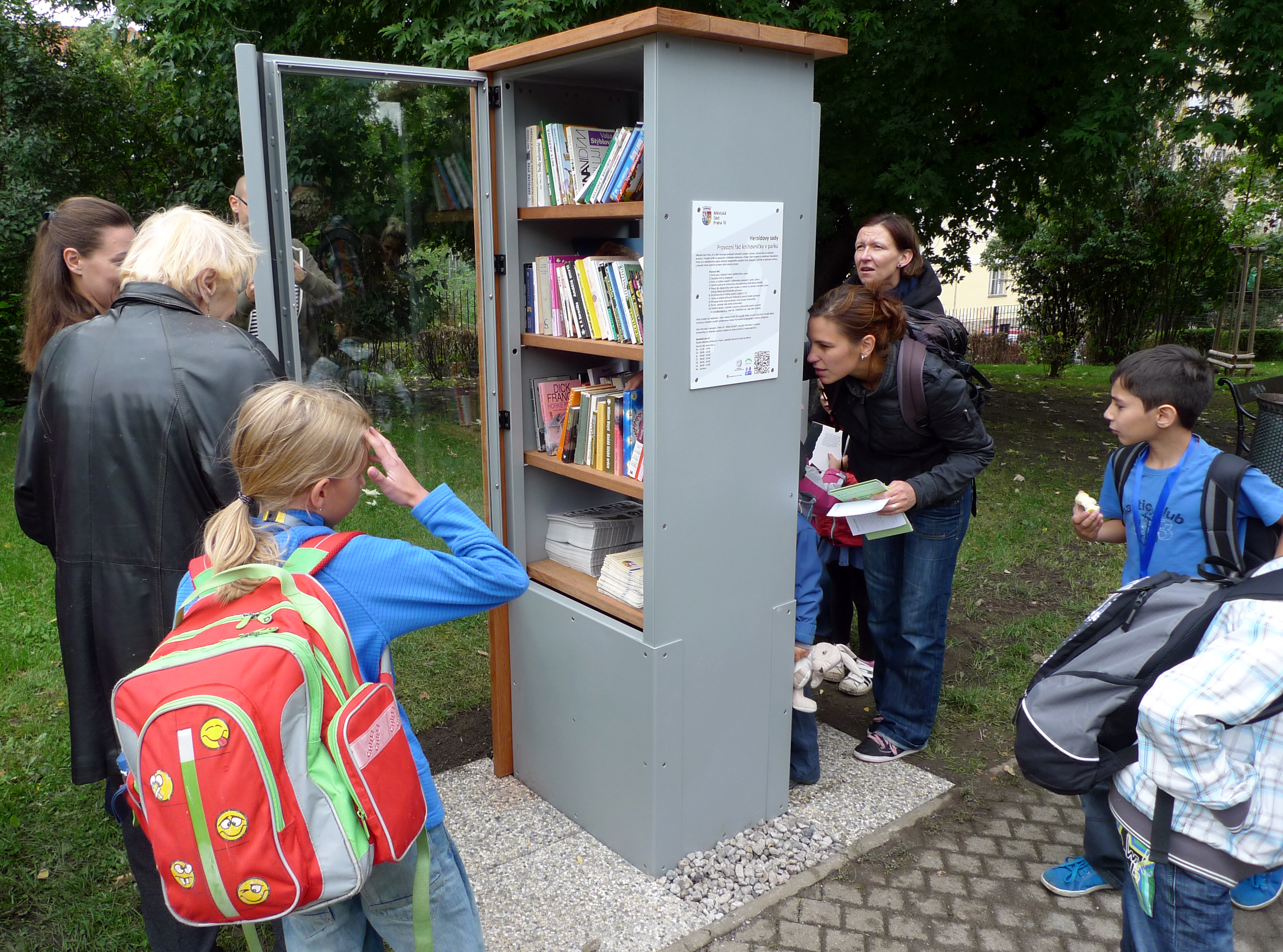 Veřejná knihovna v Heroldových sadech